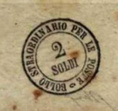 Газетная марка-штемпель Великого герцогства Тосканского